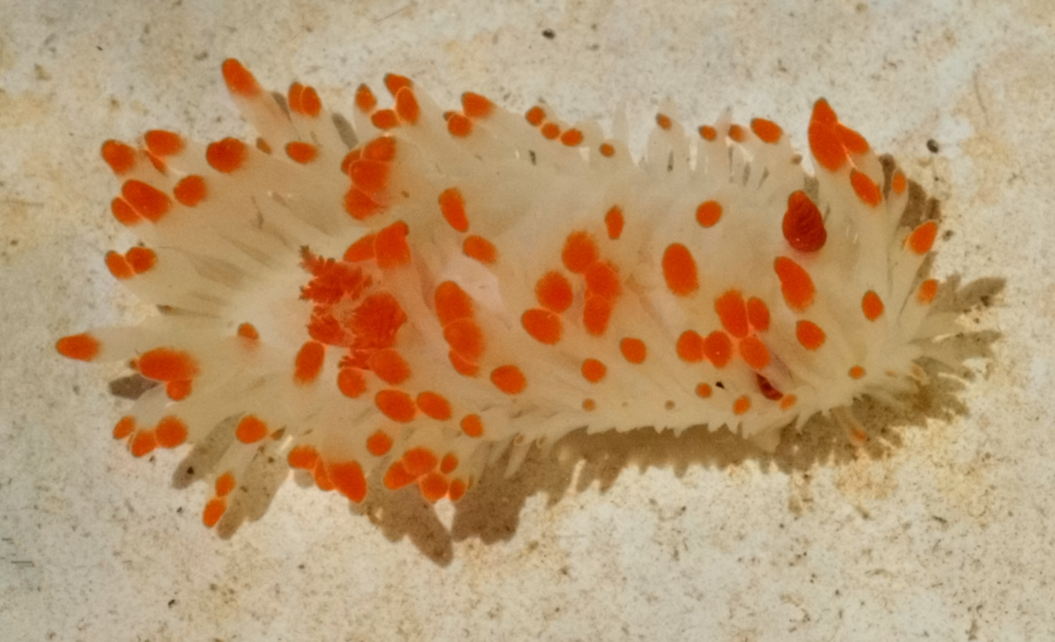 Limacia cockerelli